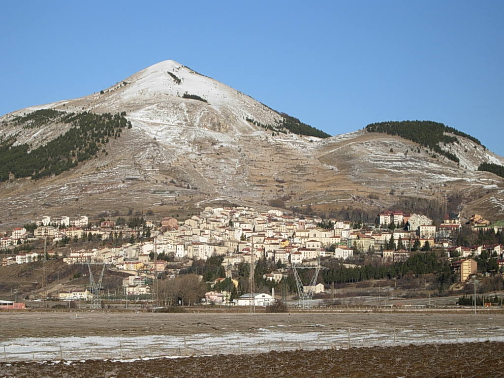 Veduta di Rivisondoli (AQ) Foto personale